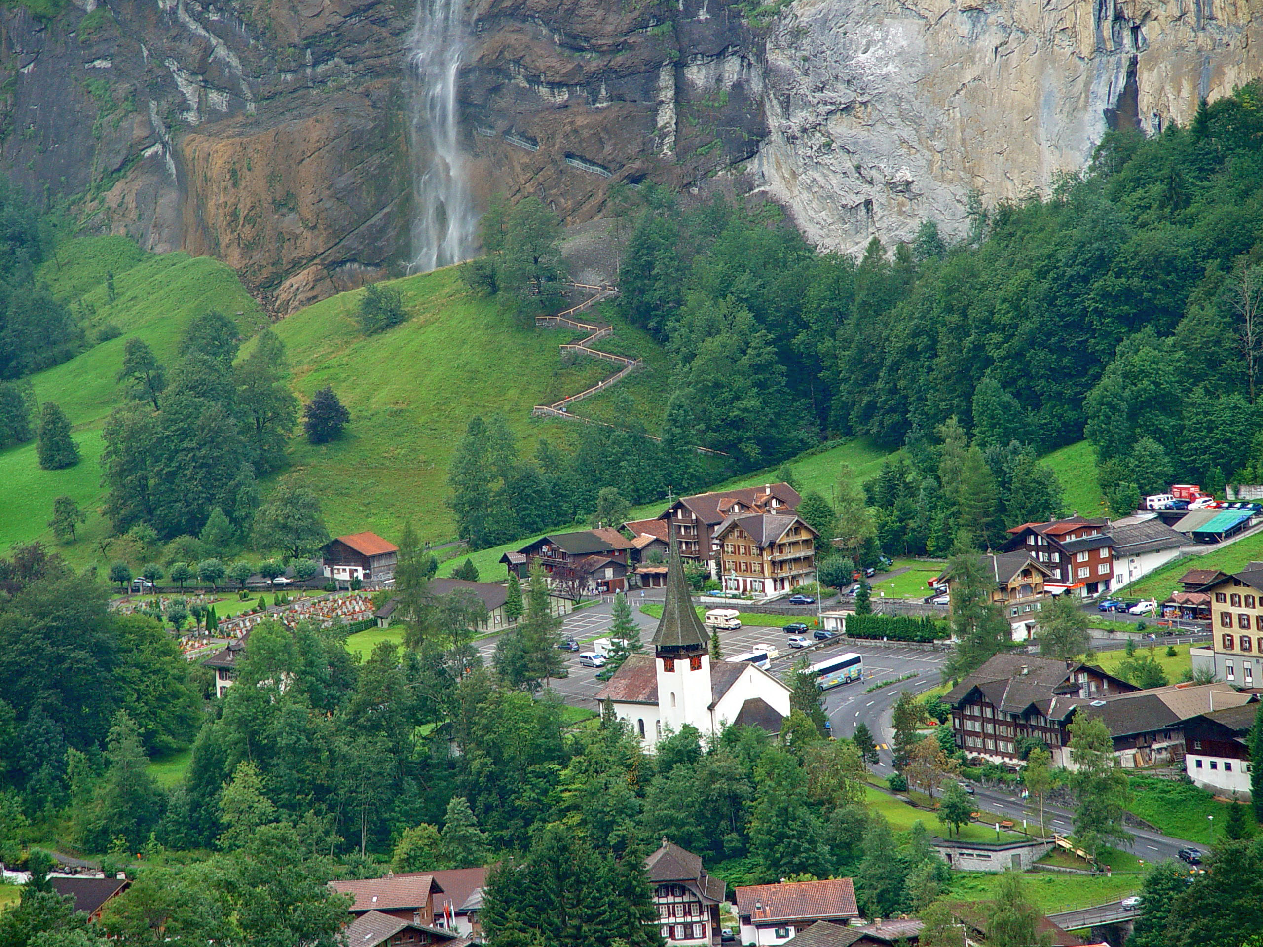 Lauterbrunnen von oben gesehen, Foto von Yesuitus2001 13:18, 18. Mär. 2007 (CET)